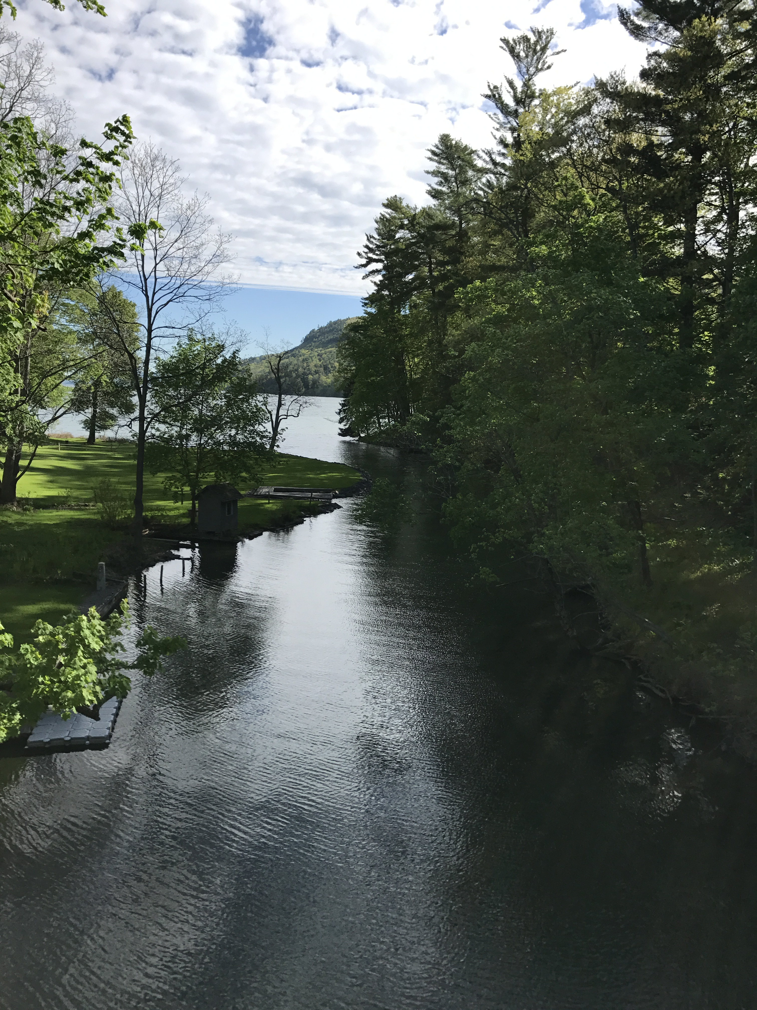 Susquehanna river at source